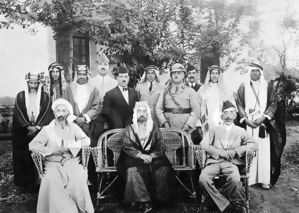 صورة تاريخية للعائلة الهاشمية في فترة تأسيس إمارة شرق الأردن ،حيث يظهر في الصورة الشريف الحسين رحمه الله